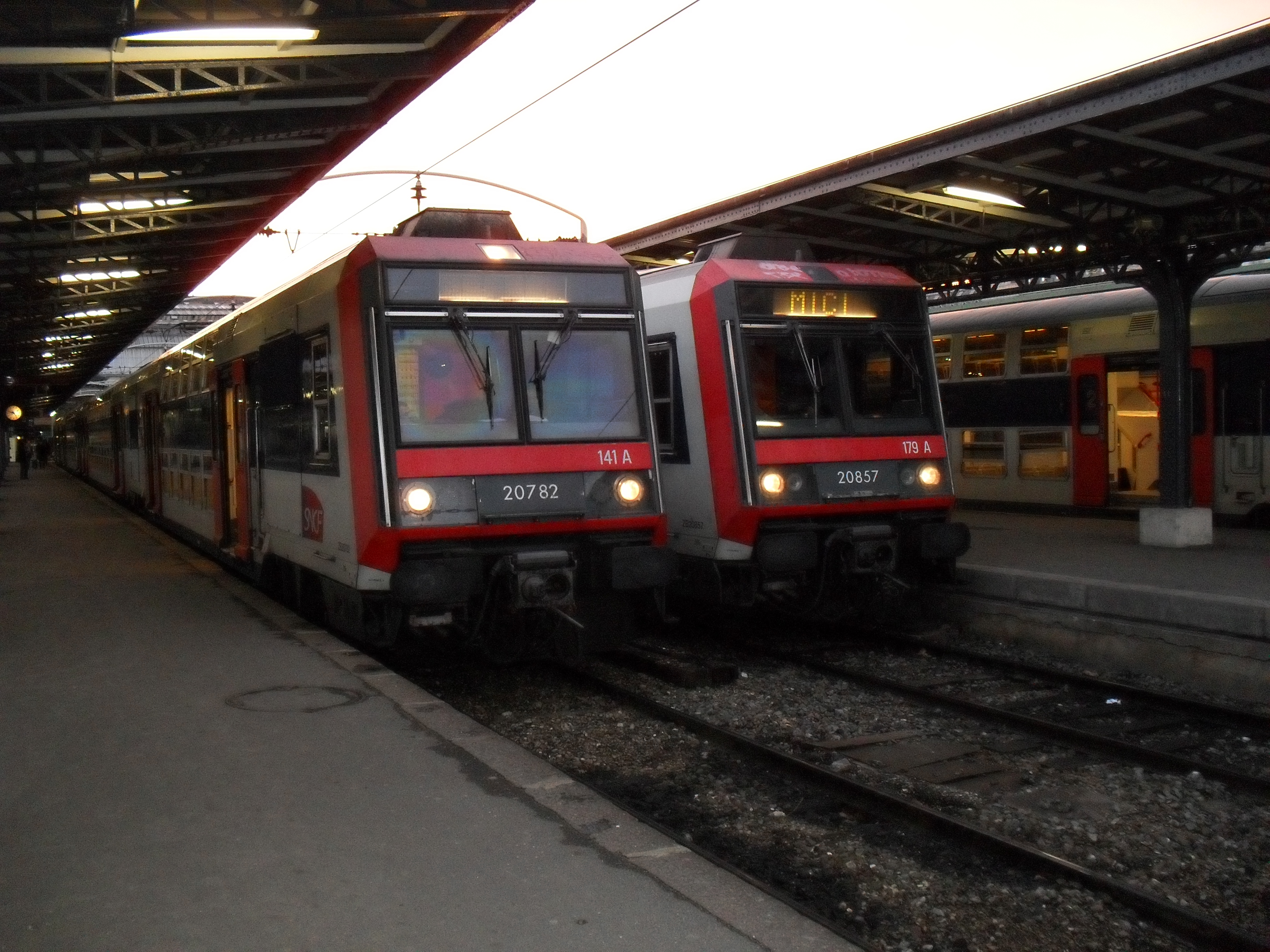 Z 20500 à Paris-Est